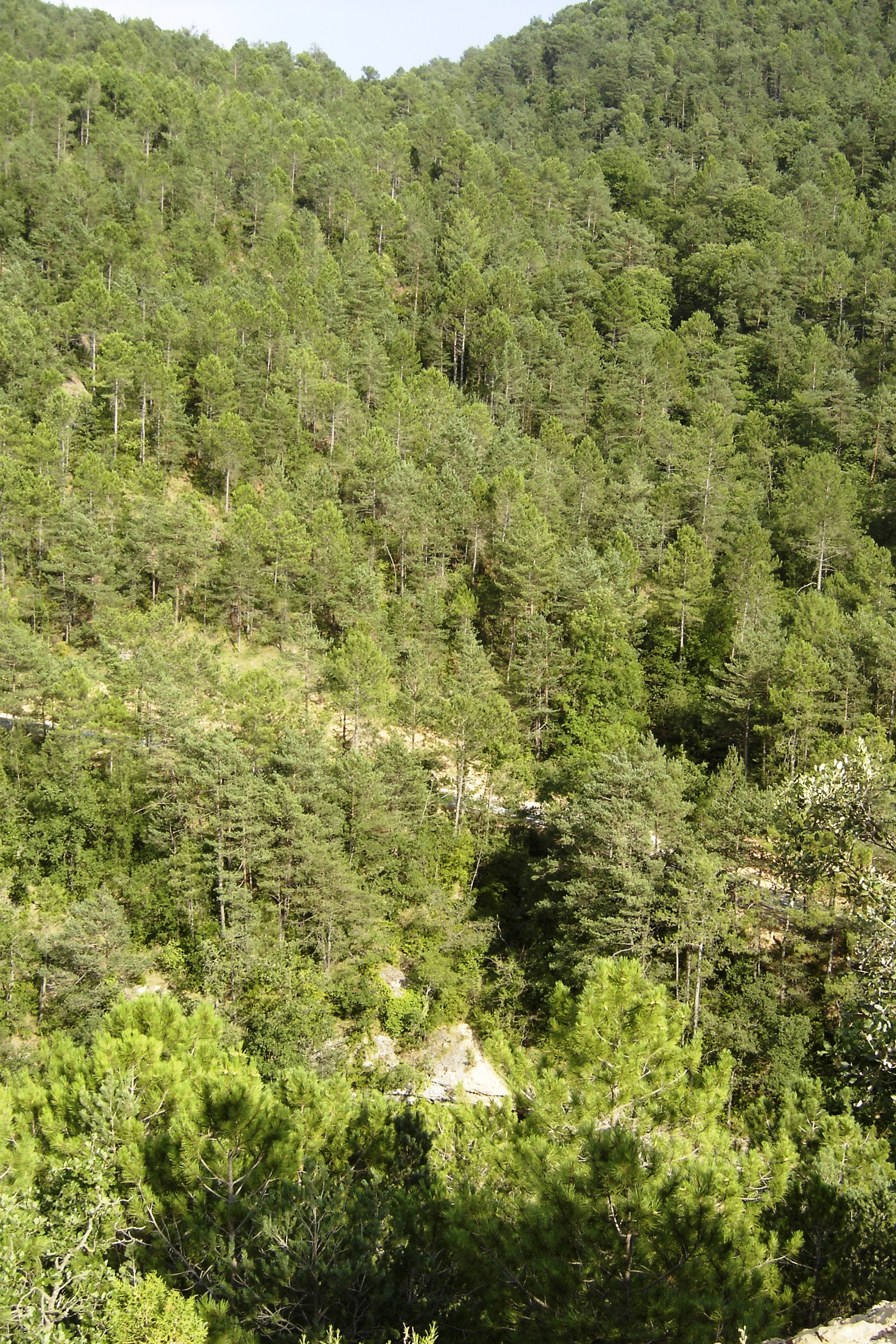 La rasa de Palou, ja havent deixat enrera l'altiplà de la masia de Palou (part superior de la foto) s'aboca cap a la Riera de Canalda per entre els pins. Travessant la imatge amb pendent cap a la dreta, s'hi vislumbra la carretera (o cami enquitranat) que va del Cap del Pla a Odèn passant pel Pont d'Orrit